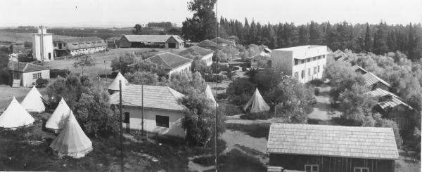 גן-שמואל - מראה כללי משנת 1940